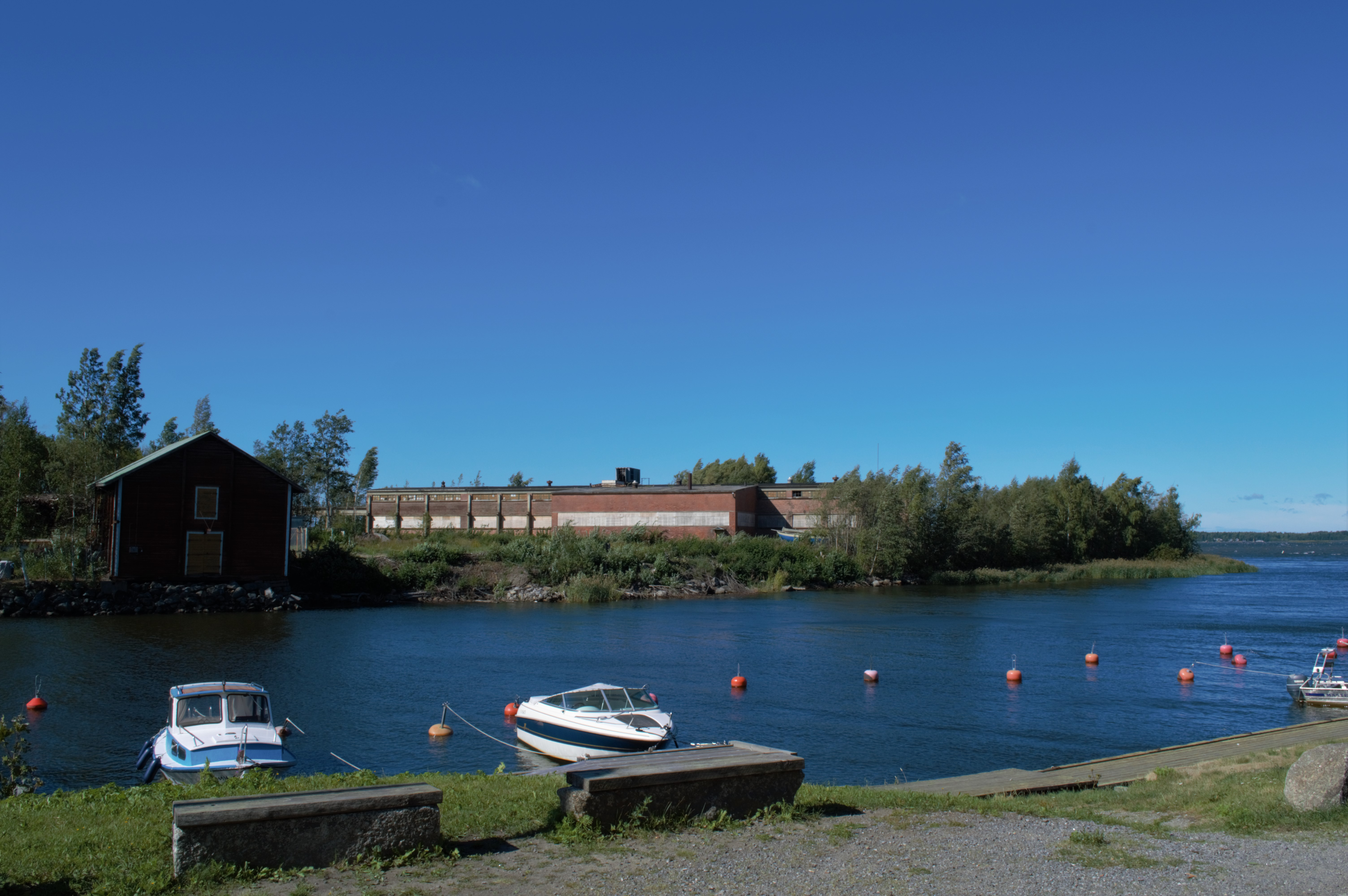 Mansikkasaaren pohjoista osaa, missä on vanhoja makasiinirakennuksia